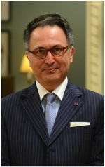 Portrait de son Excellence l'Ambasadeur Raoul Delcorde